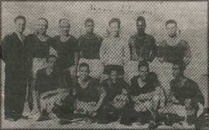 Équipe du Wydad de Casablanca lors de la saison 1941-1942